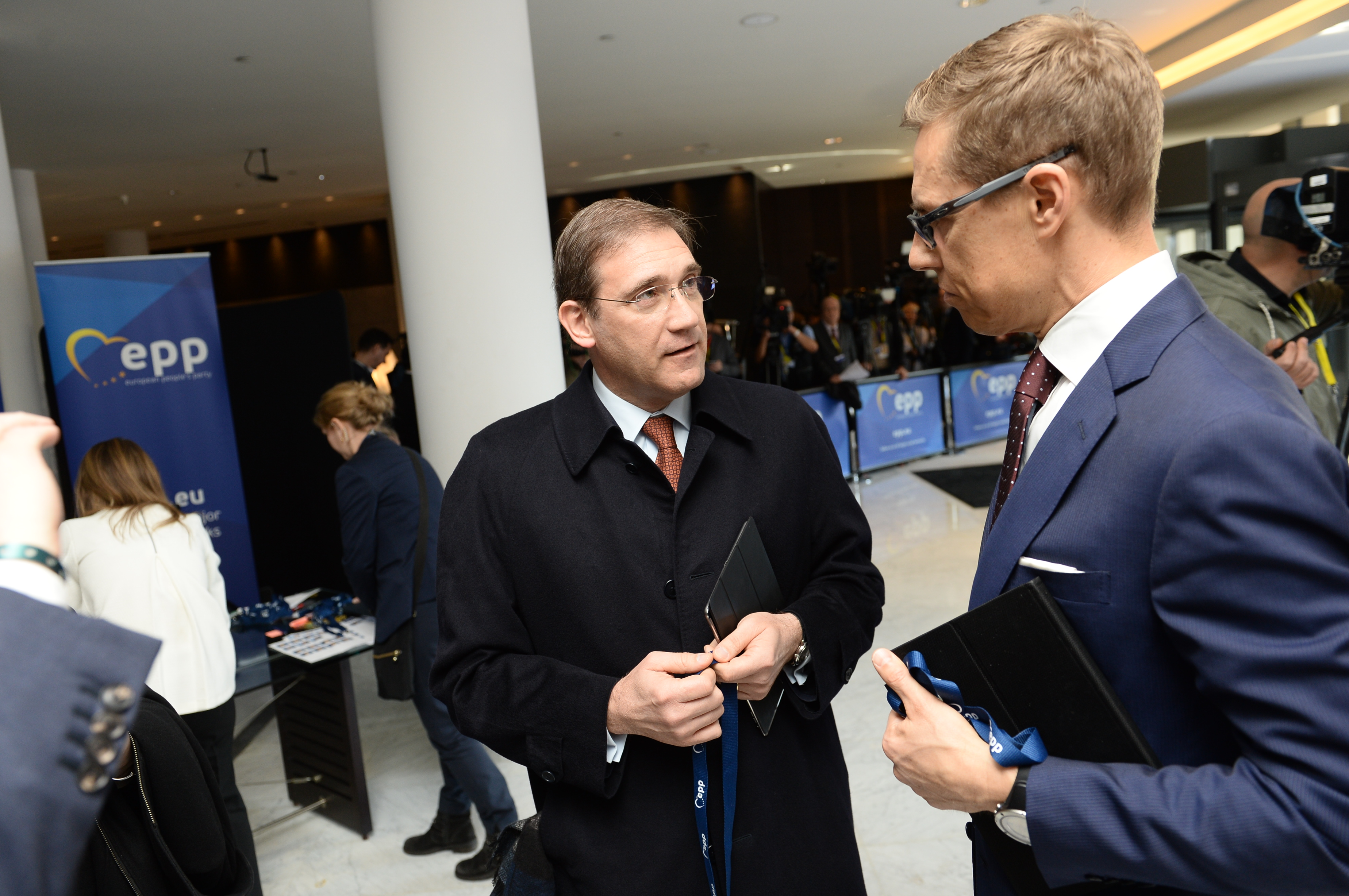 EPP Summit, Brussels, March 2016